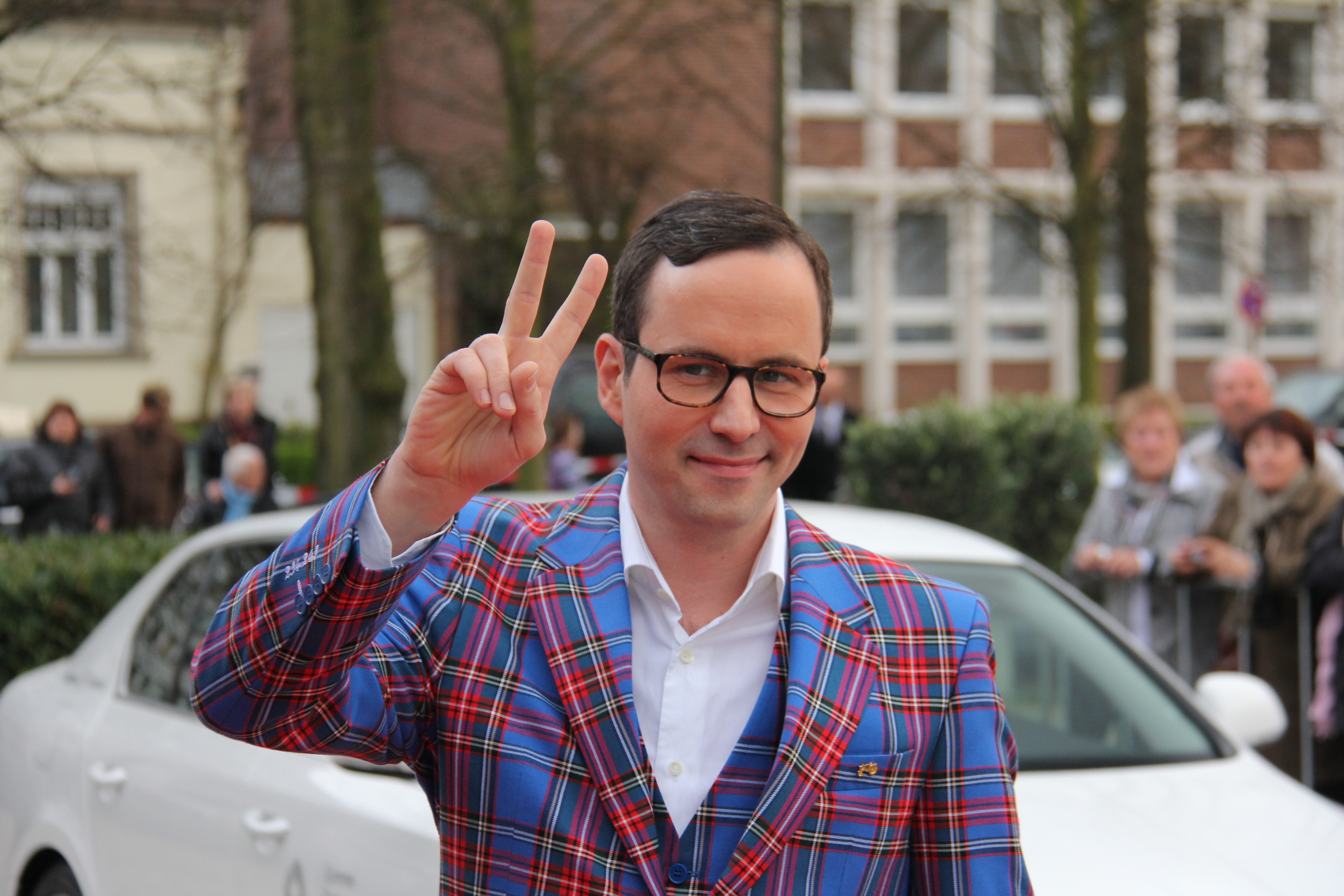 Grimme-Preisträger Kurt Krömer bei der Verleihung 2011